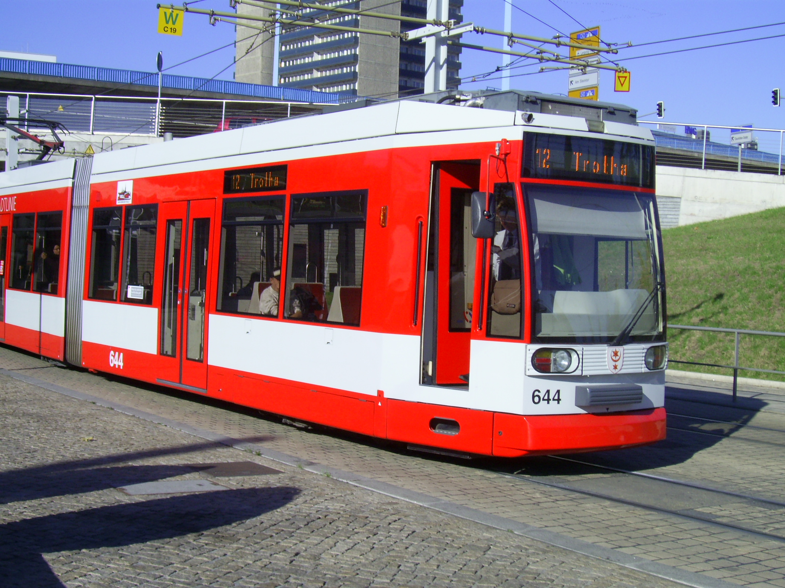 Strassenbahn Halle Tw 644